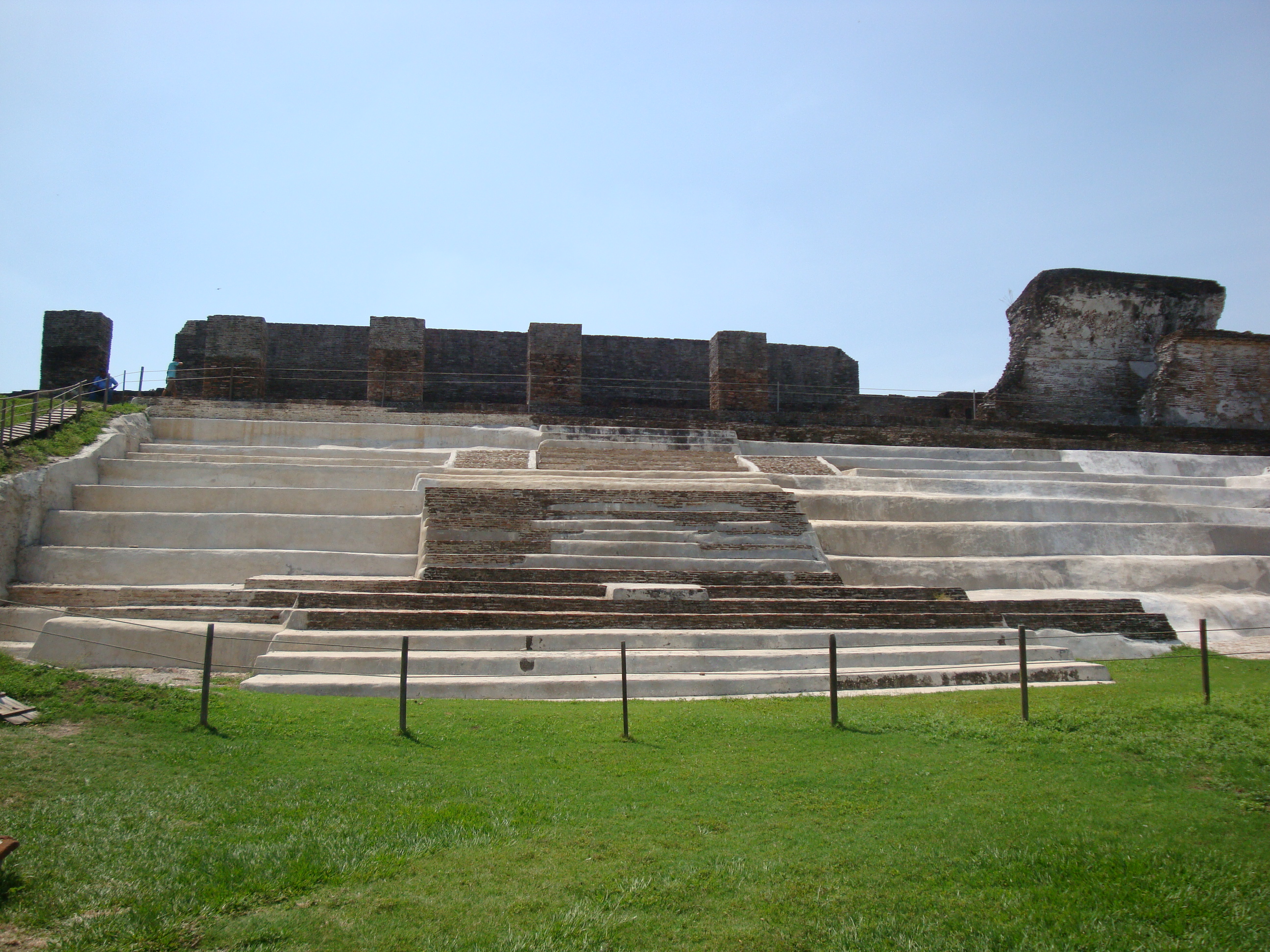 El Palacio, zona arqueológica maya de Comalcalco, Tabasco, México.